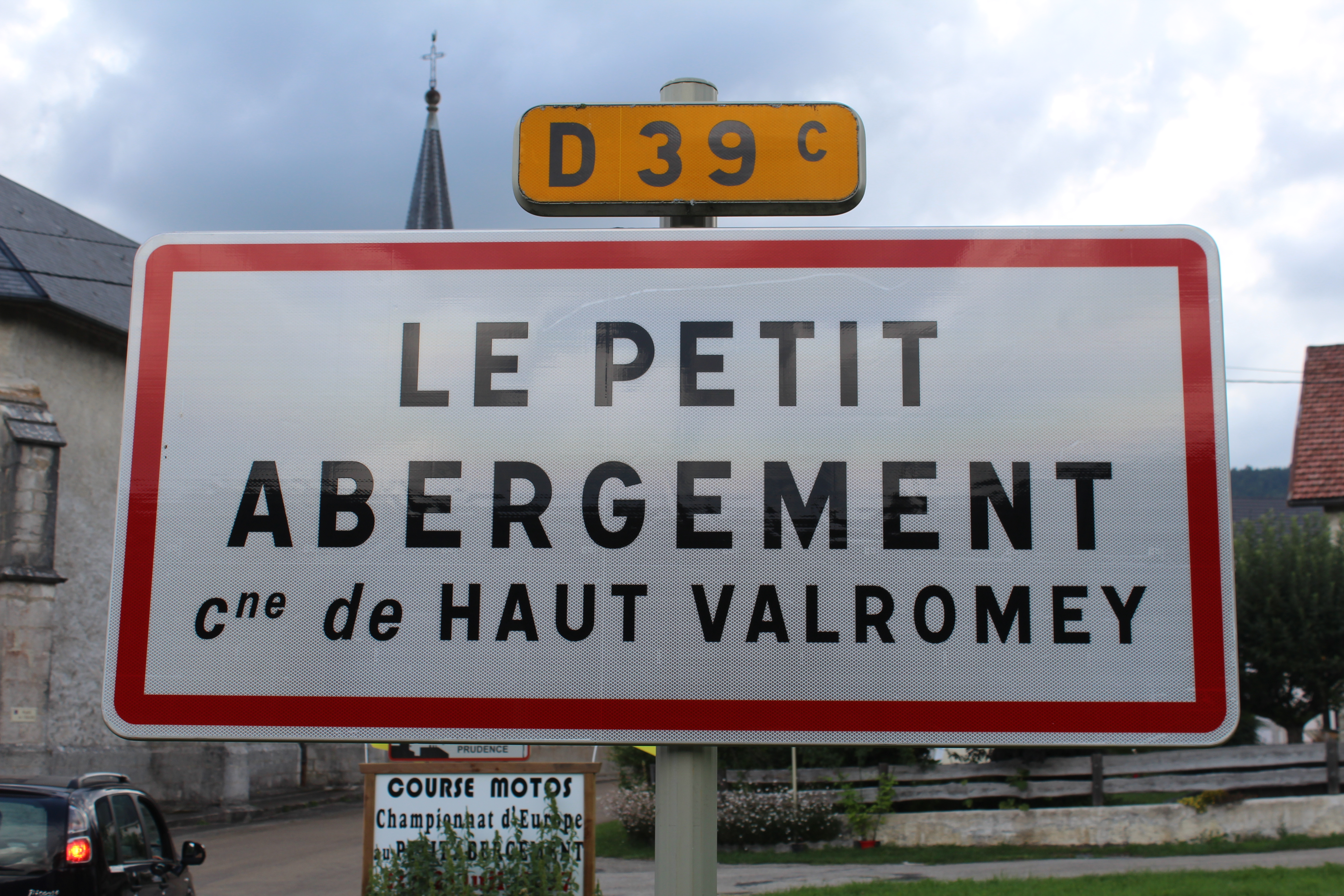 Undetermined language : Panneau d'entrée dans Le Petit-Abergement, Haut-Valromey.